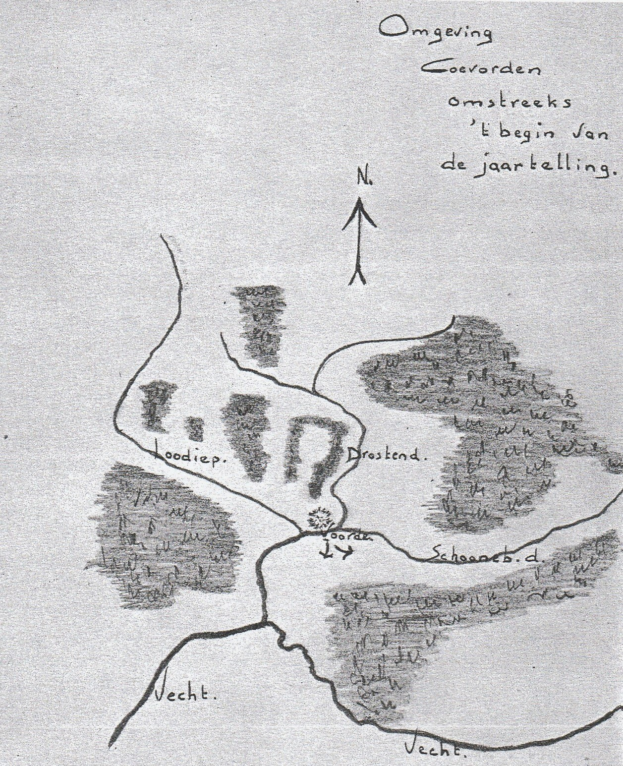 De verschillende beken die door Coevorden stromen